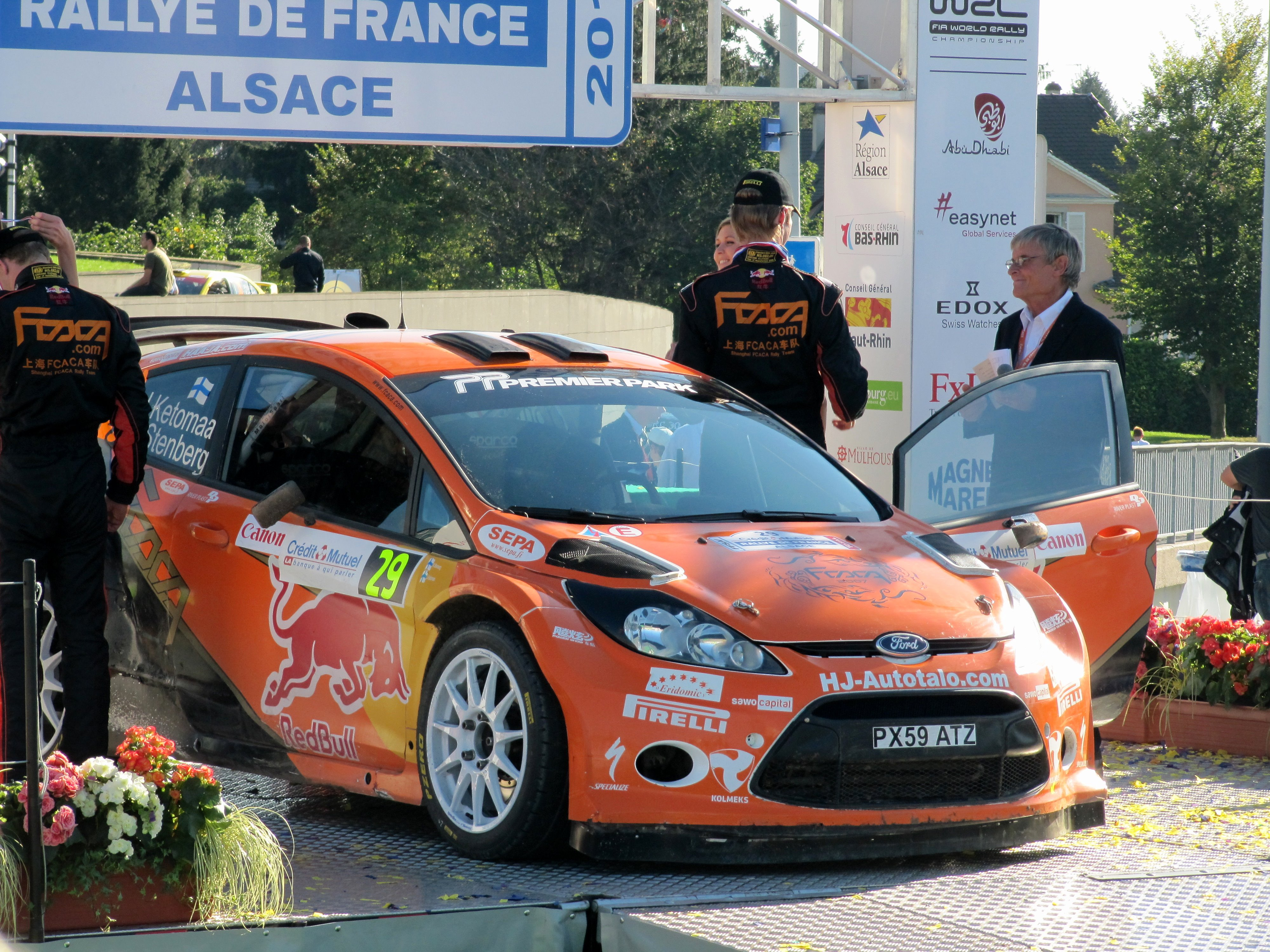 Jari Ketomaa en Rally France-Alsacia 2010